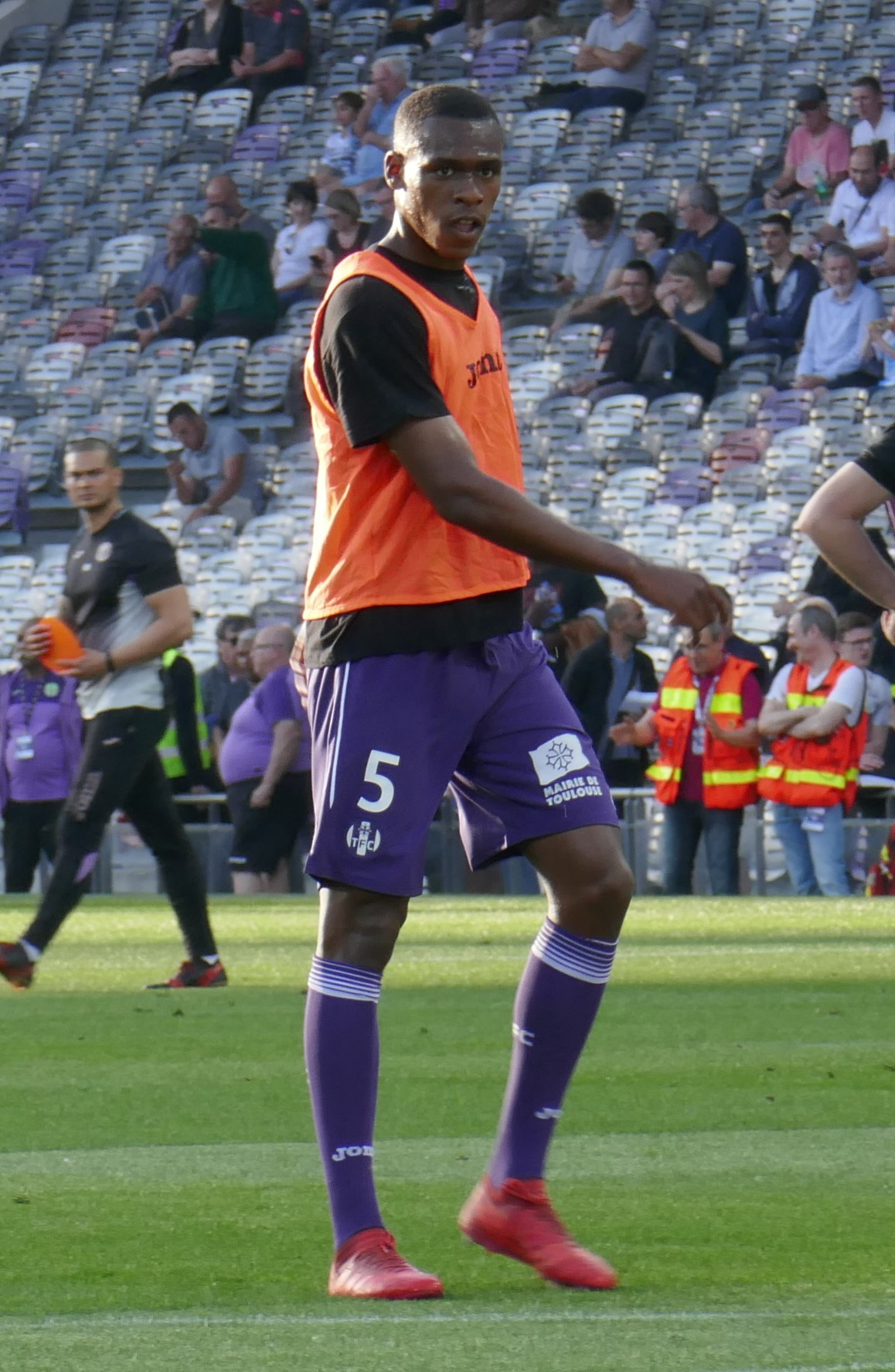 Issa Diop lors de l'échauffement du match Toulouse FC - Angers SCO comptant pour la 34ème journée de Ligue 1 2017-2018, le 21 avril 2018.